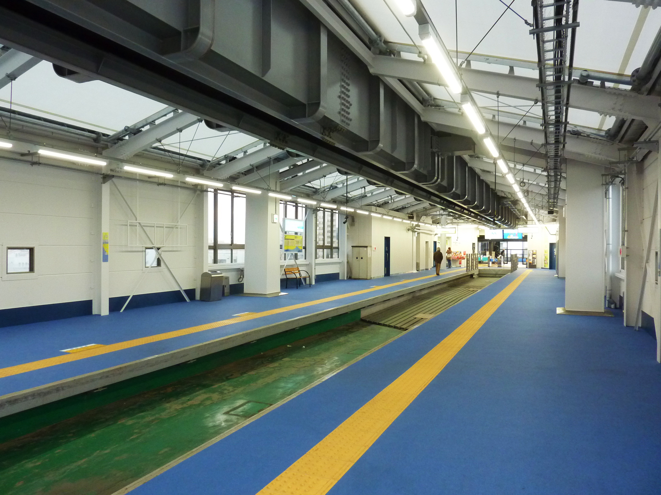 2018年12月現在の乗降ホーム。終端部の先が改札口。